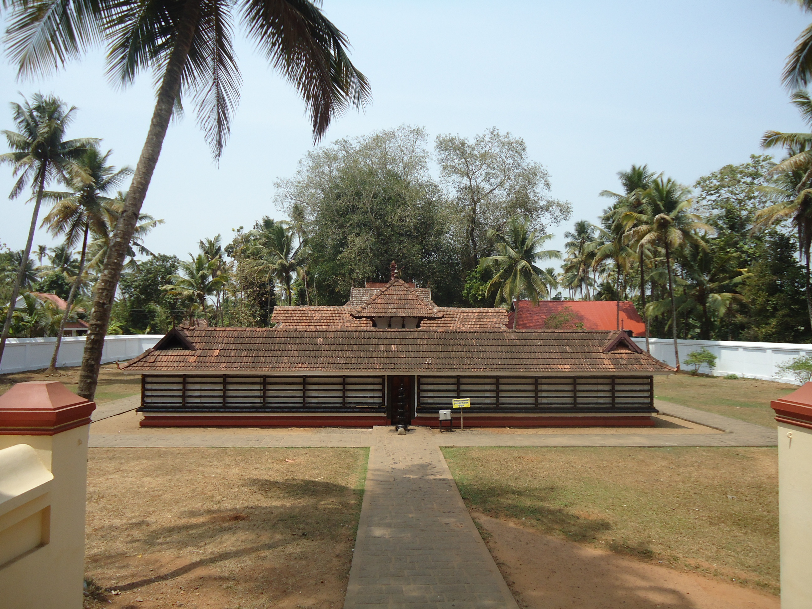 Karppillikavu Sree Mahadeva Temple Manjapra